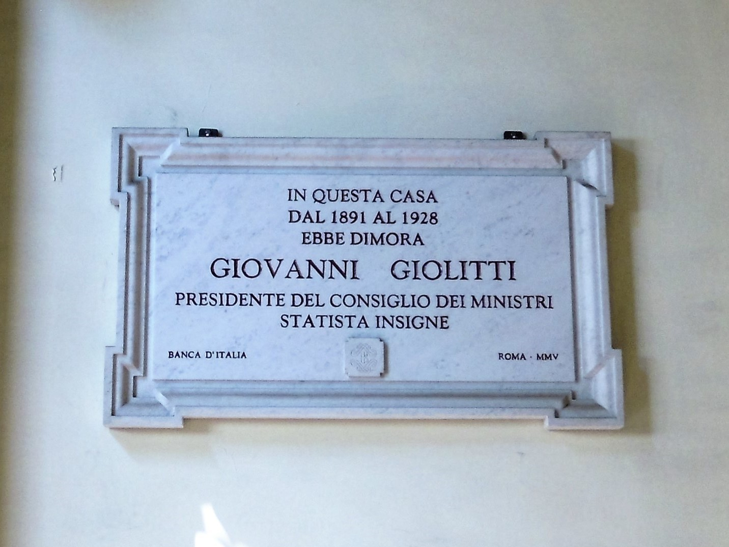 Lapide commemorativa di Giovanni Giolitti nell'androne dell'edificio di via Cavour 71 - Roma, rione Monti